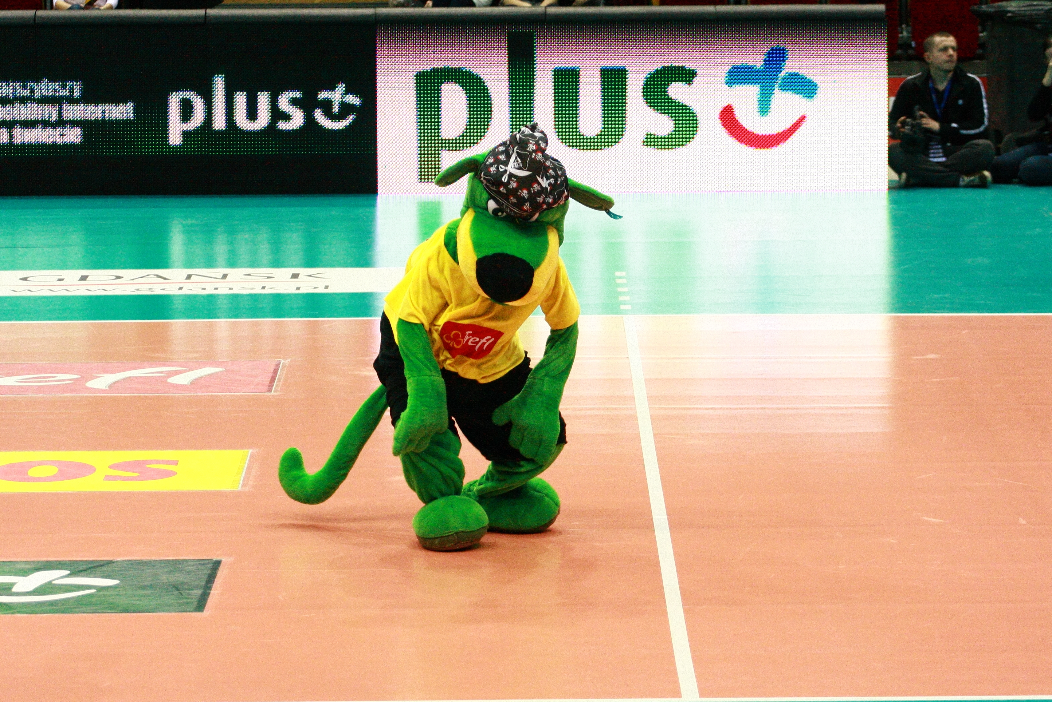 "Treflik" (maskotka zespołu Trefl Gdańsk). Mecz Lotos Trefl Gdańsk vs Skra Bełchatów.